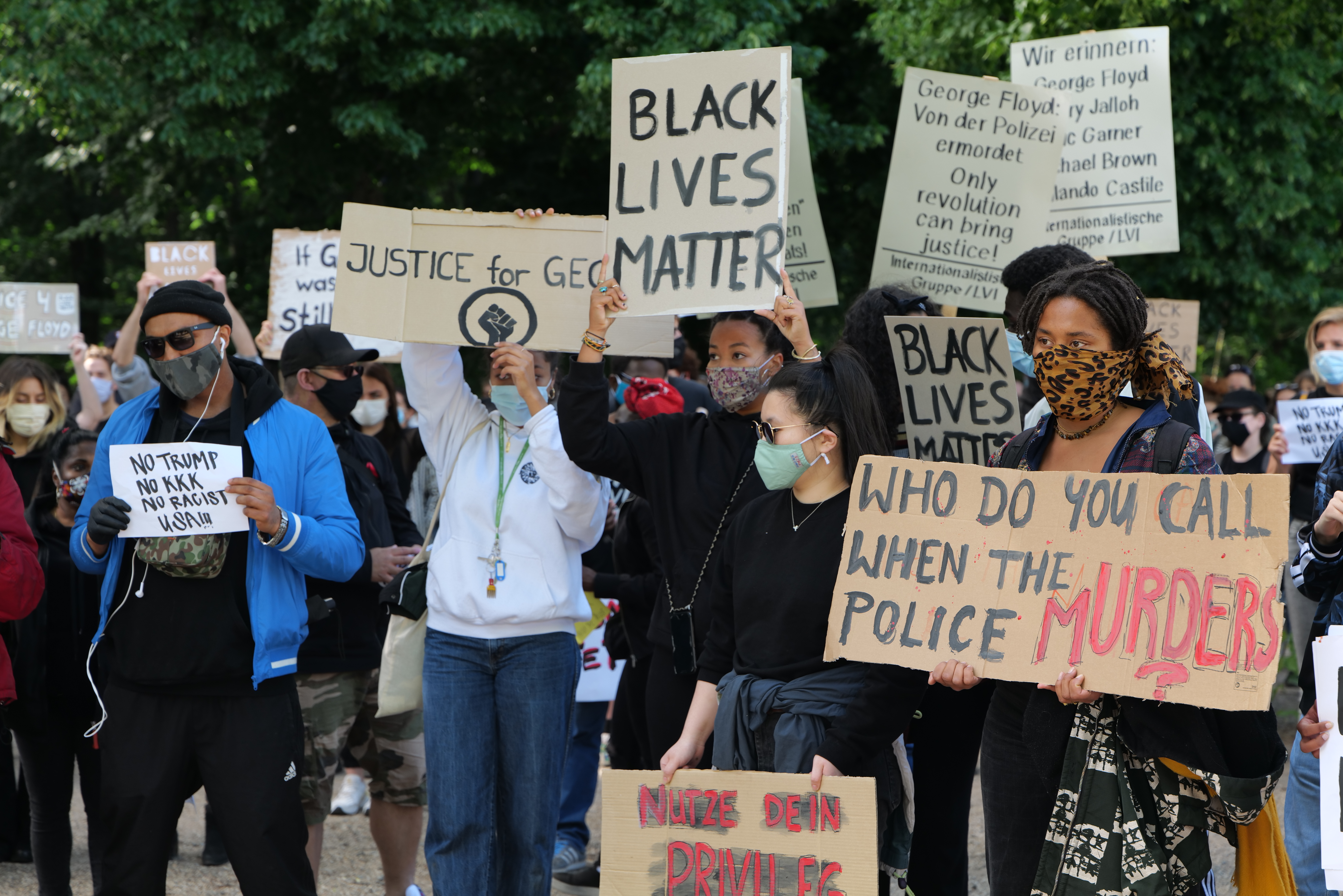 Kundgebung gegen Rassismus und Polizeigewalt an der Botschaft der USA in Berlin nach dem Mord an George Floyd durch einen Polizisten in den USA am 30. Mai 2020.